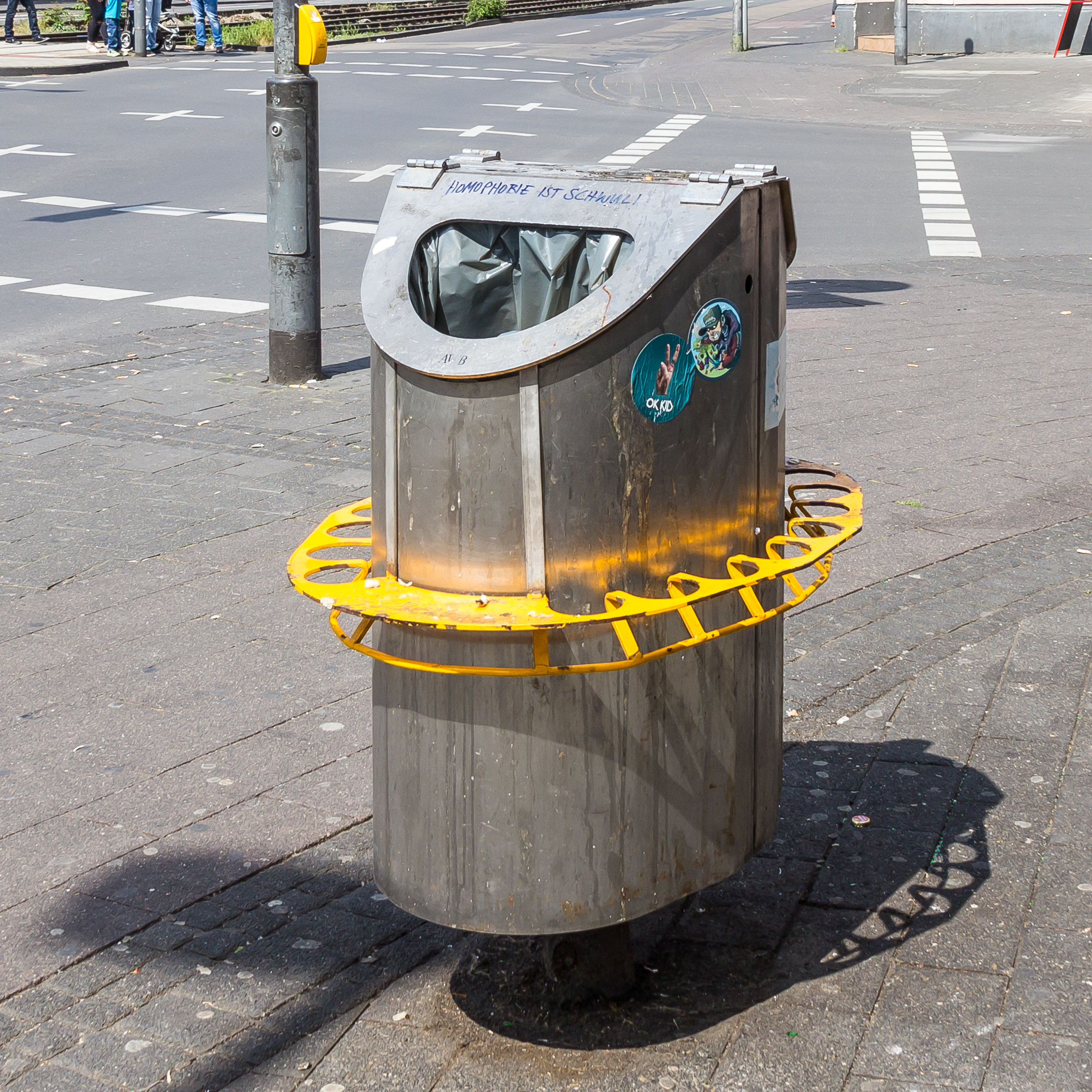 Pfandring, angebracht an einem Abfalleimer Kreuzung Venloer Straße/Ehrenfeldgürtel, Köln-Ehrenfeld. Ergebnis Pilotversuch Pfandringe vom Februar 2016 (unter „Anlage 856 KB“ oben rechts)